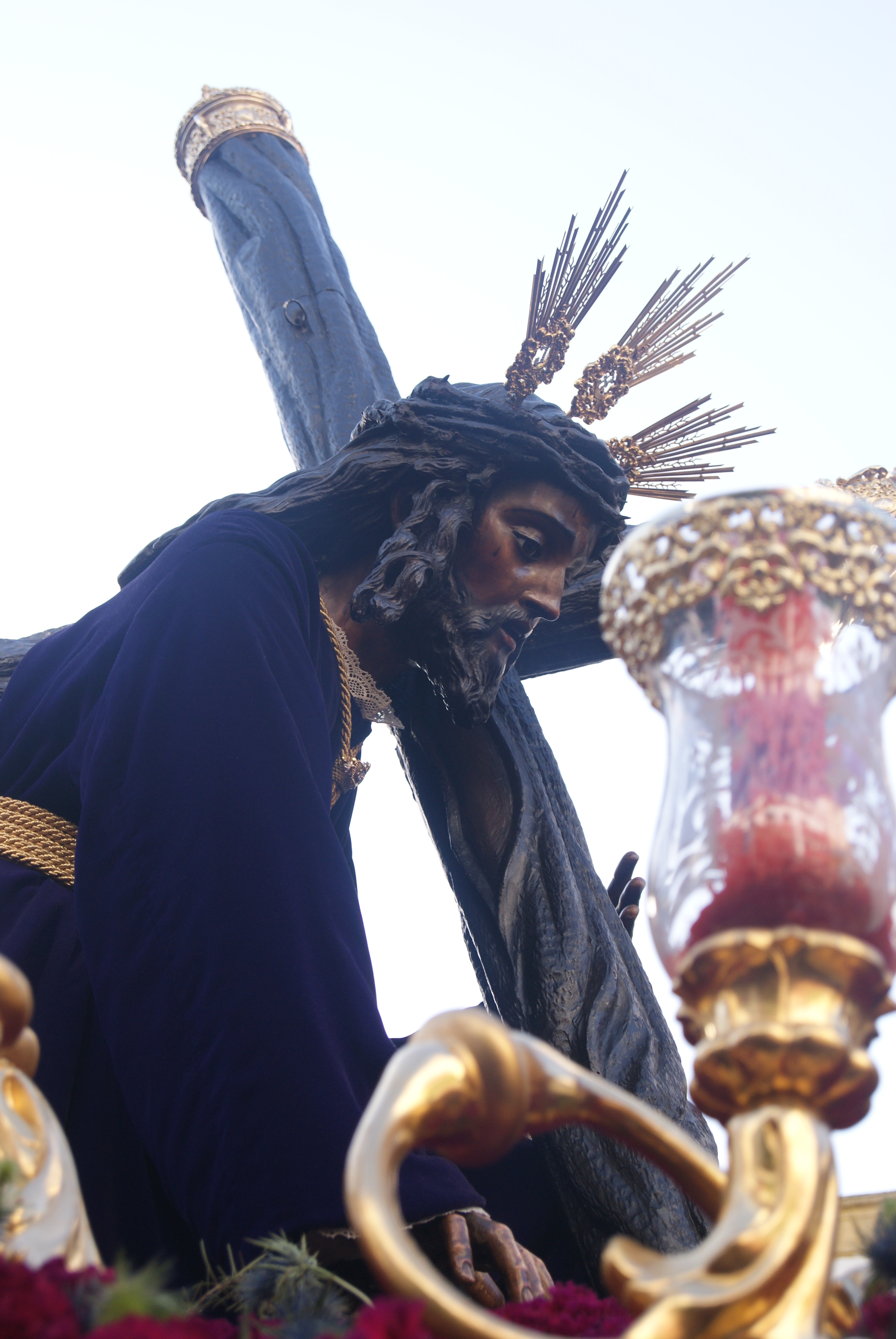 El Cristo de la Hermandad de la Esperanza de Triana en su paso de misterio.